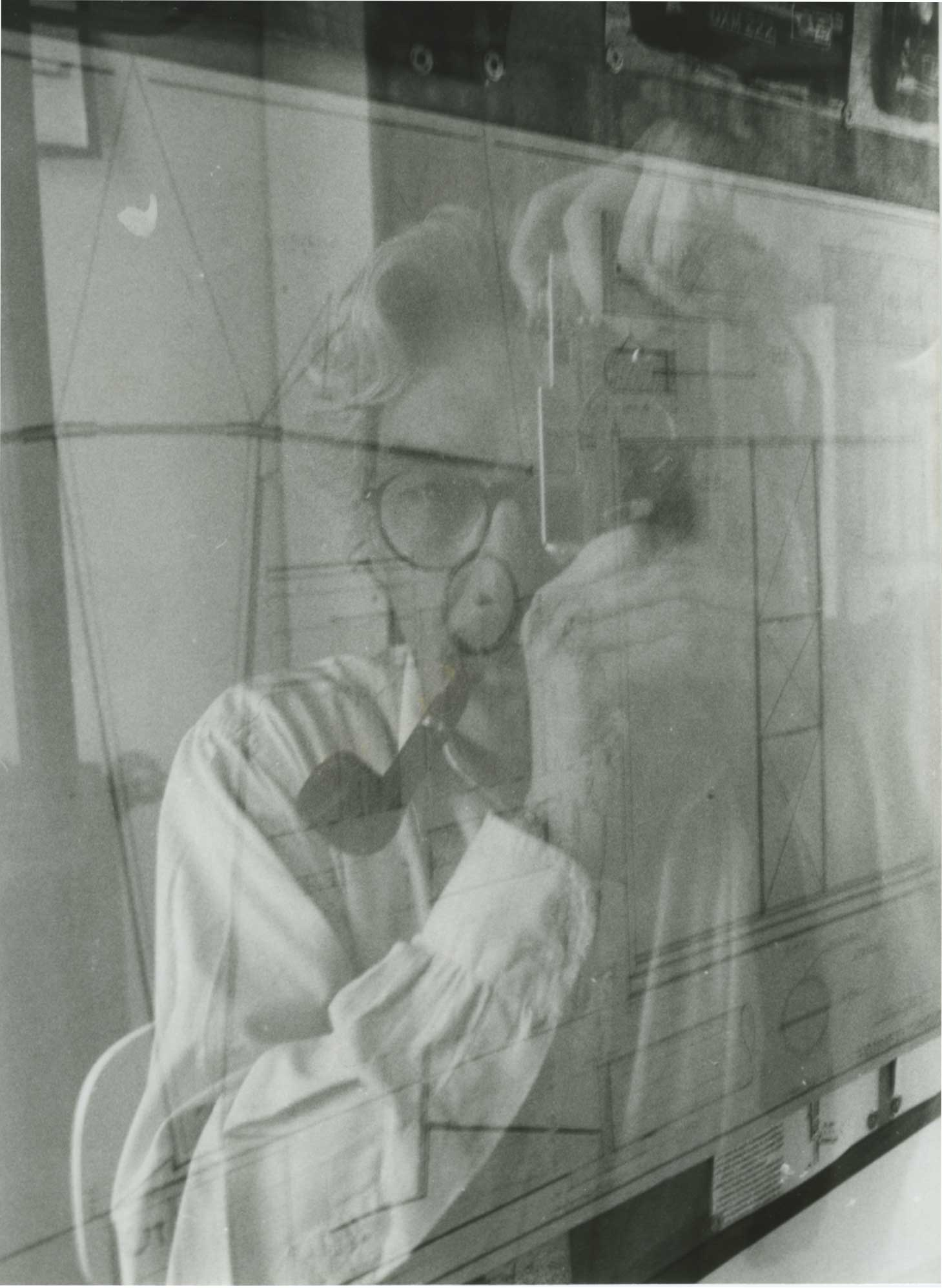 Francesco Gostoli